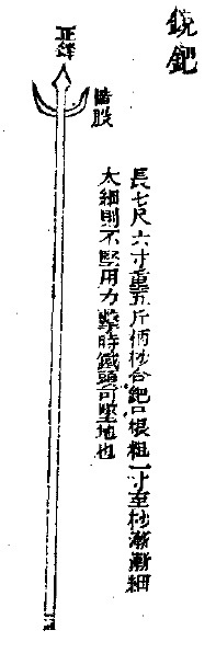 Тан. Убэй чжи, XVII век.